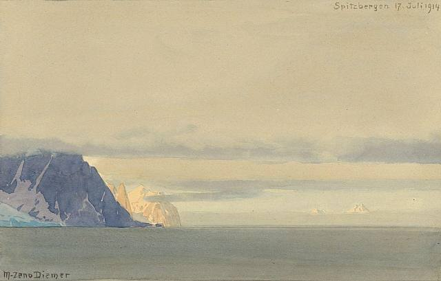 Spitzbergen ; Gemälde von Michael Zeno Diemer